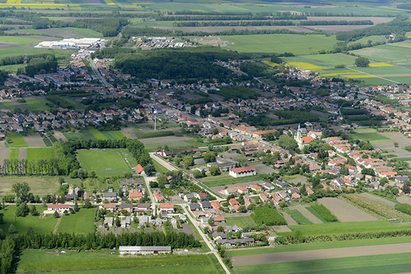 Szany látképe madártávlatból